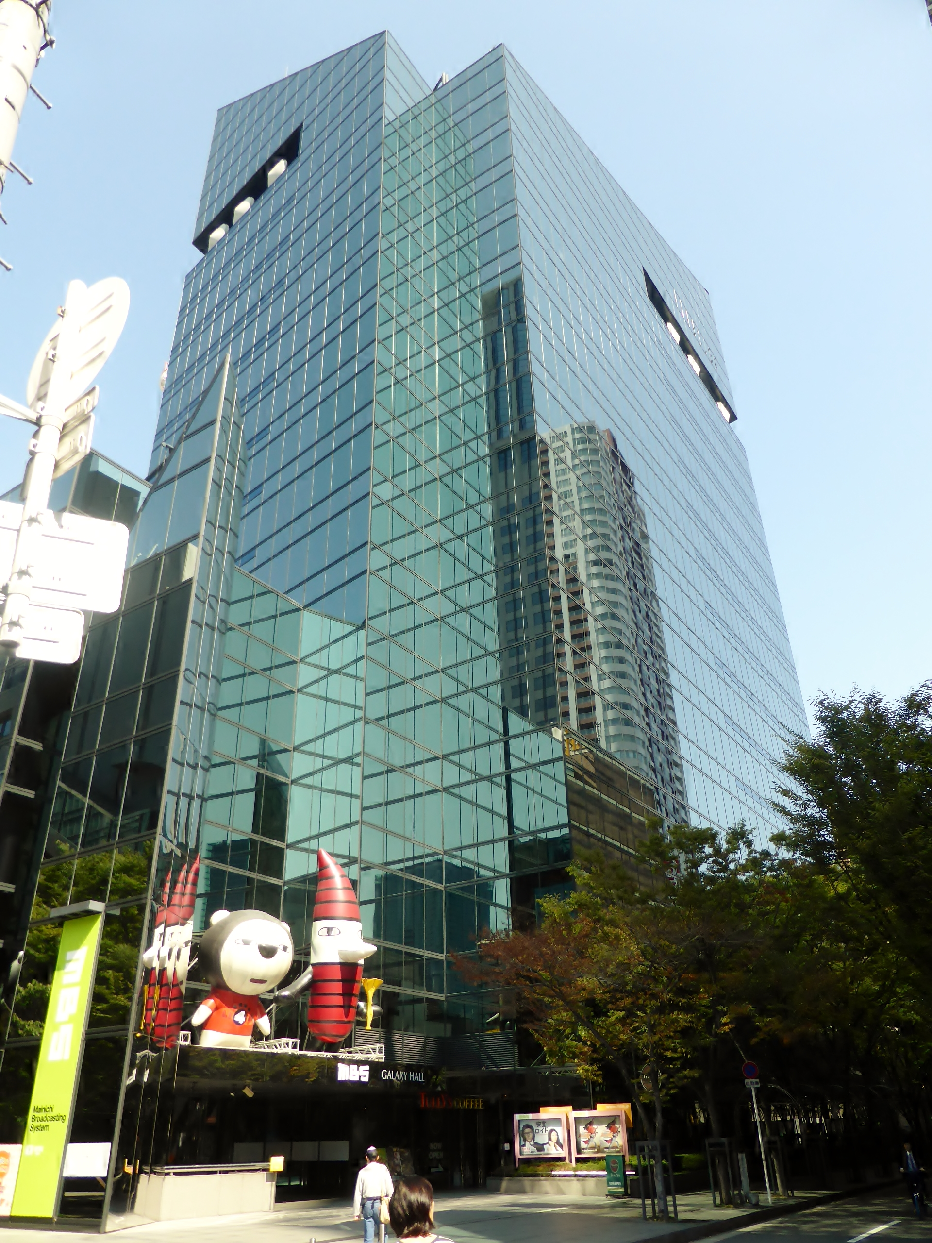 株式会社毎日放送本社を撮影。